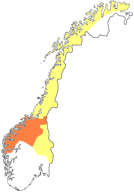 Kartet viser utbredelsen av palatalisering i norske dialekter. Det gule området har palatalisering bare i trykksterke stavelser, det oransje området både i trykksterke og trykksvake stavelser.